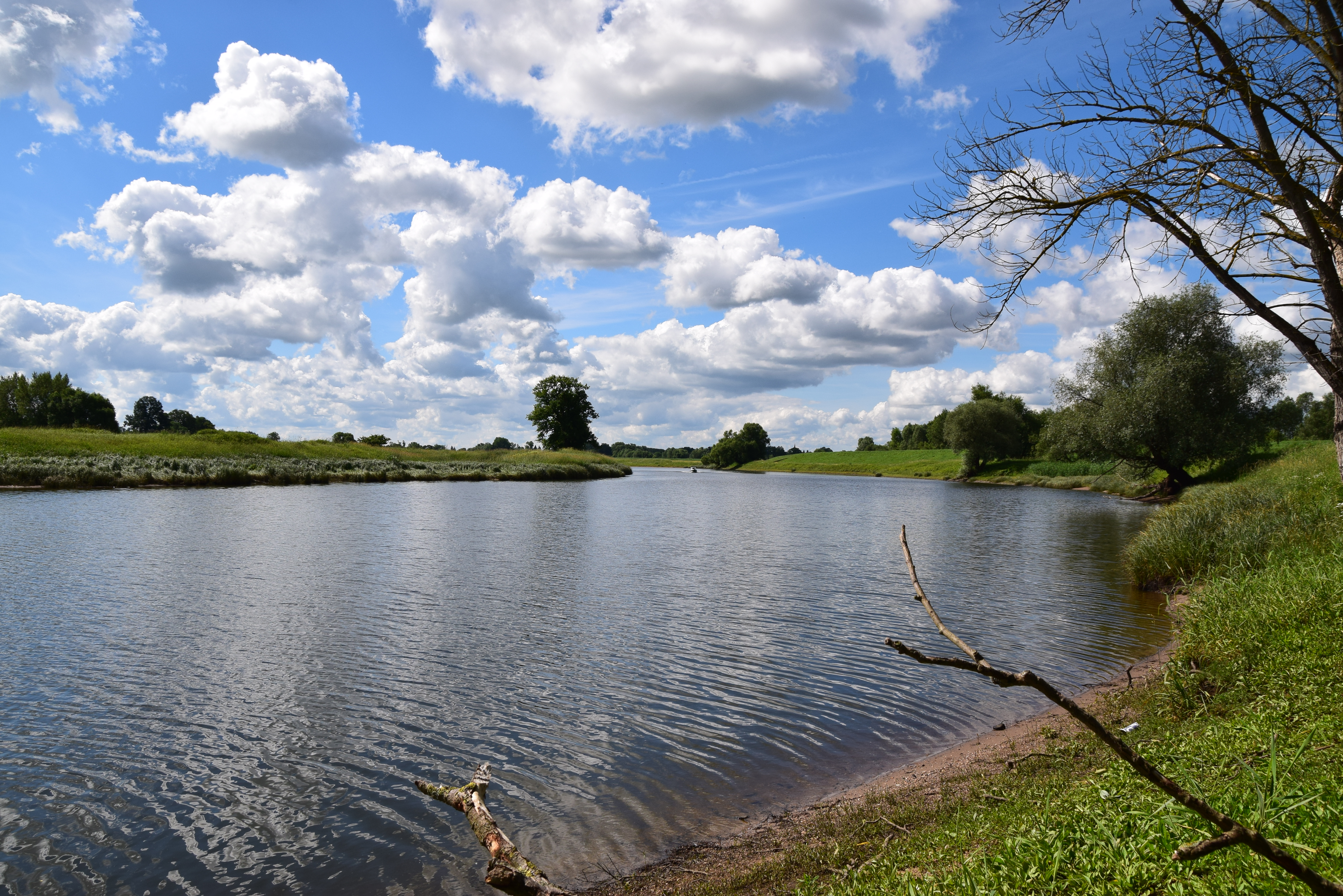 Sommerhimmel überm Naturschutzgebiet „Aland-Elbe-Niederung“ (NSG Nr. 388), Sachsen-Anhalt